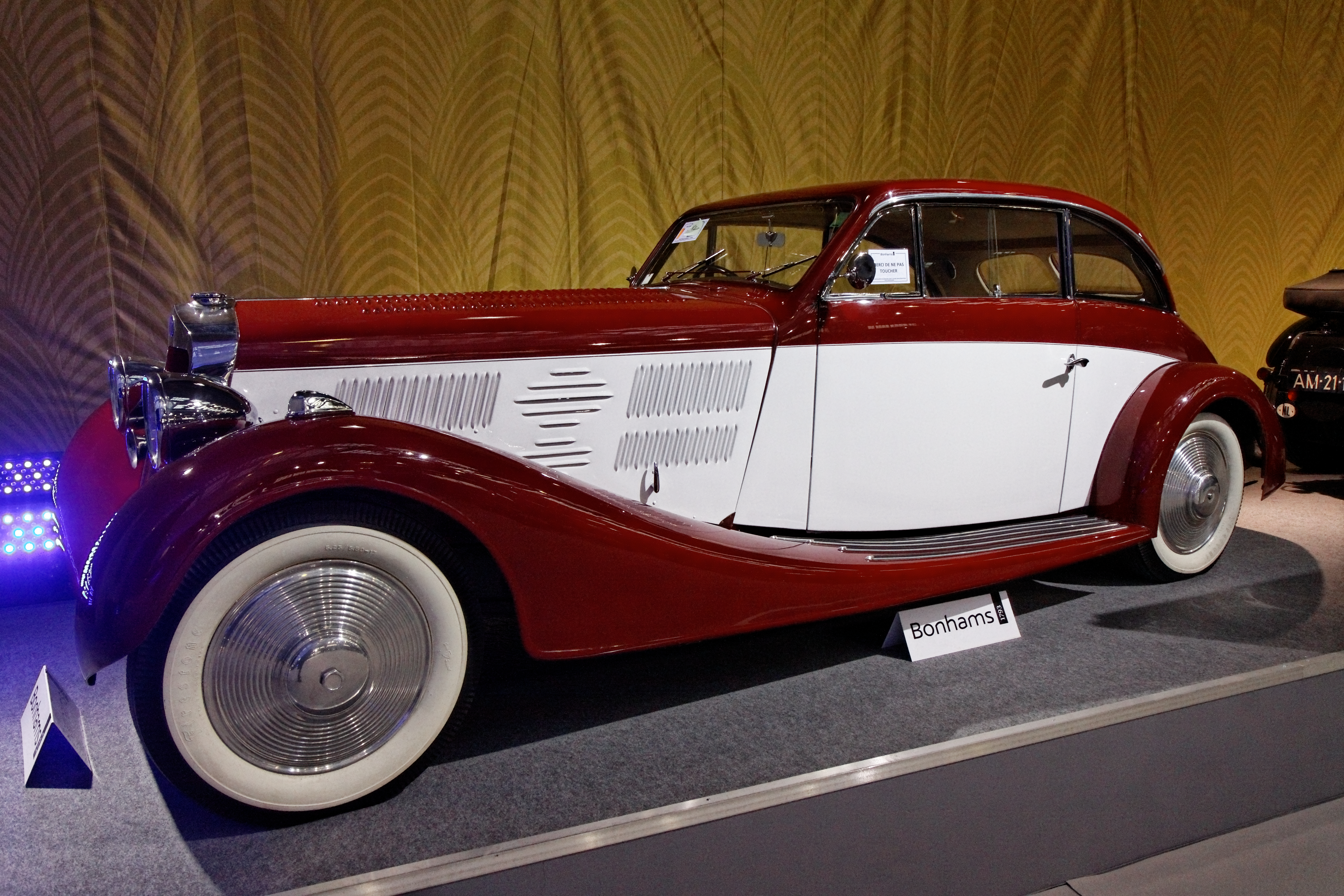 Delage D8-105 Sport Coupé